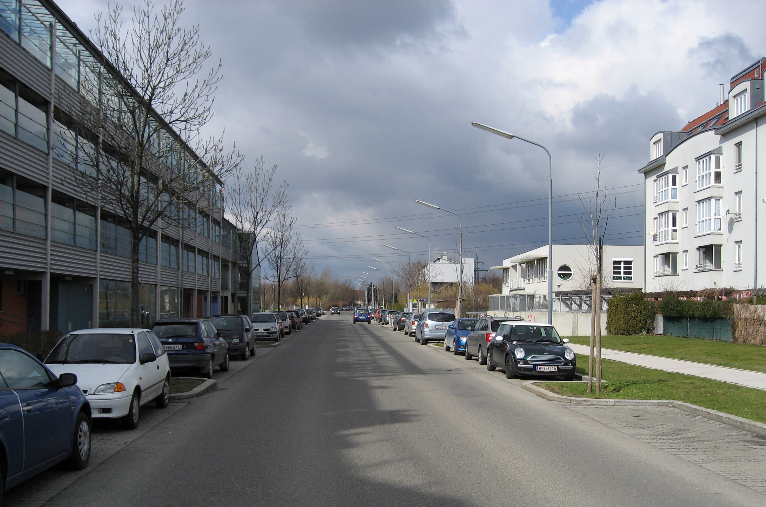 Wien, Donaustadt, Wulzendorfstraße